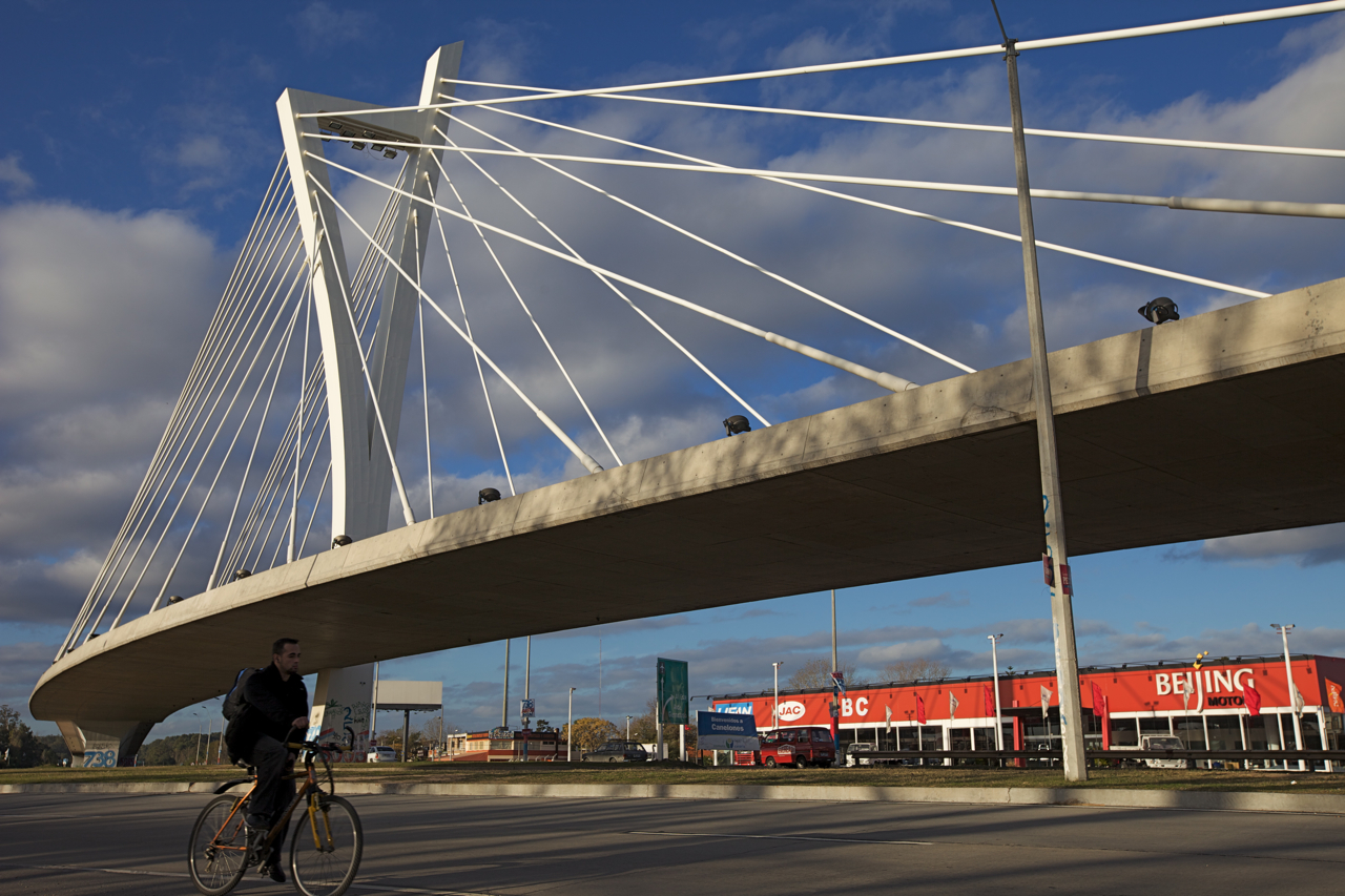 146 metros de largo, 44.5 metros de altura y 52 pilotes tensados. Diseño del ingeniero español Julio Martínez Calzón. Publshed